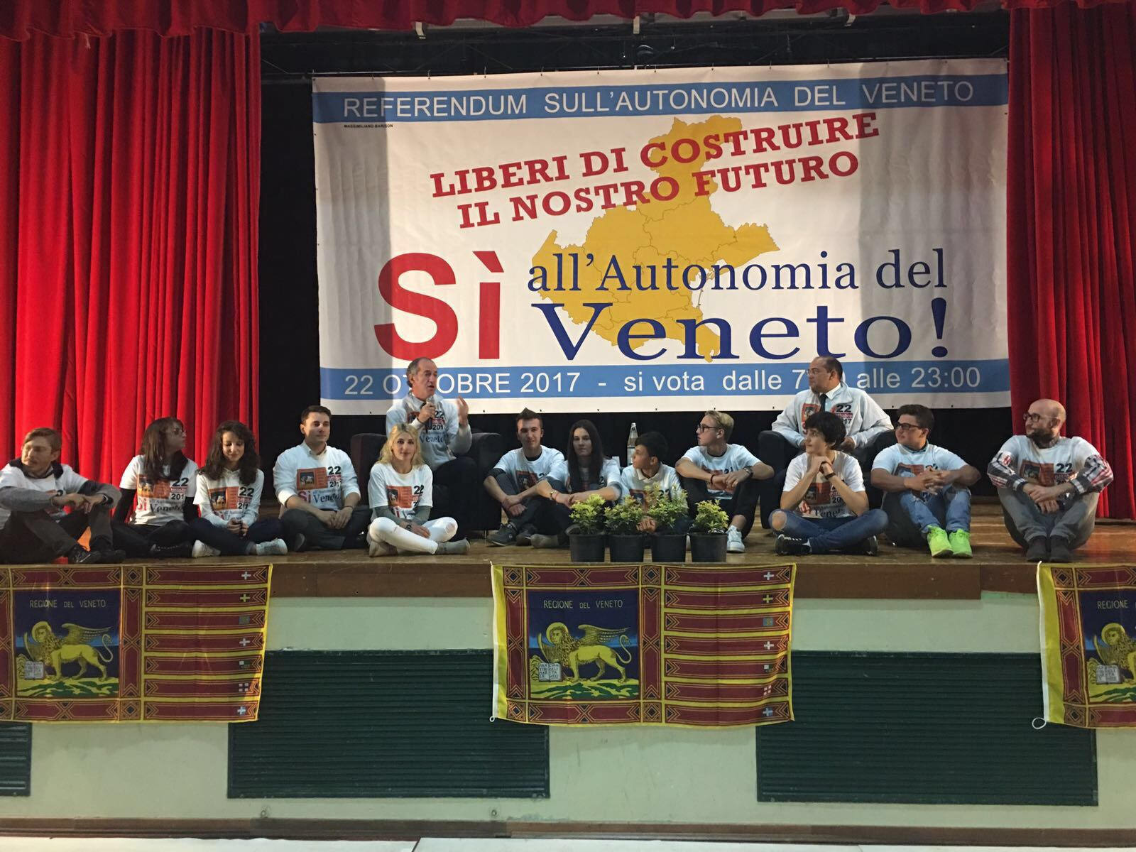 Alcune foto dall'evento "Le Ragioni del Sì" - 11 ottobre 2017, ore 18.00, Palazzetto Polivalente di Albignasego